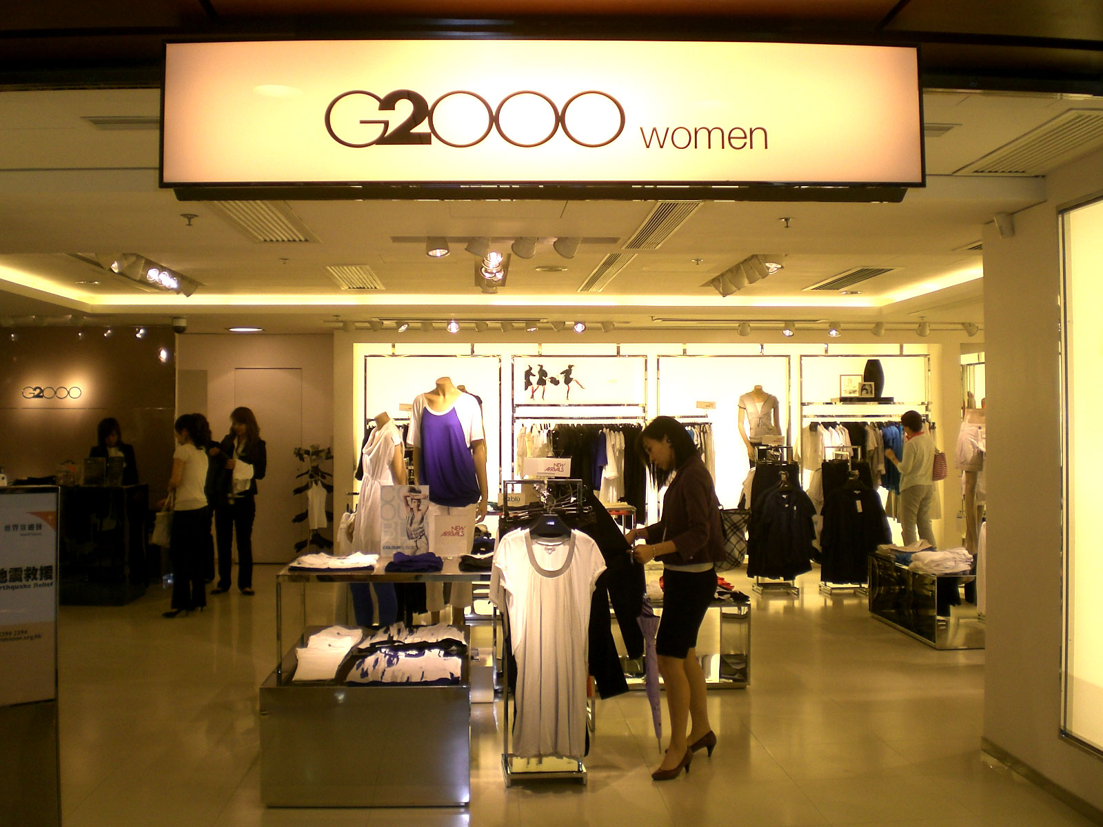 商店縱橫二千集團@九龍灣德福廣場